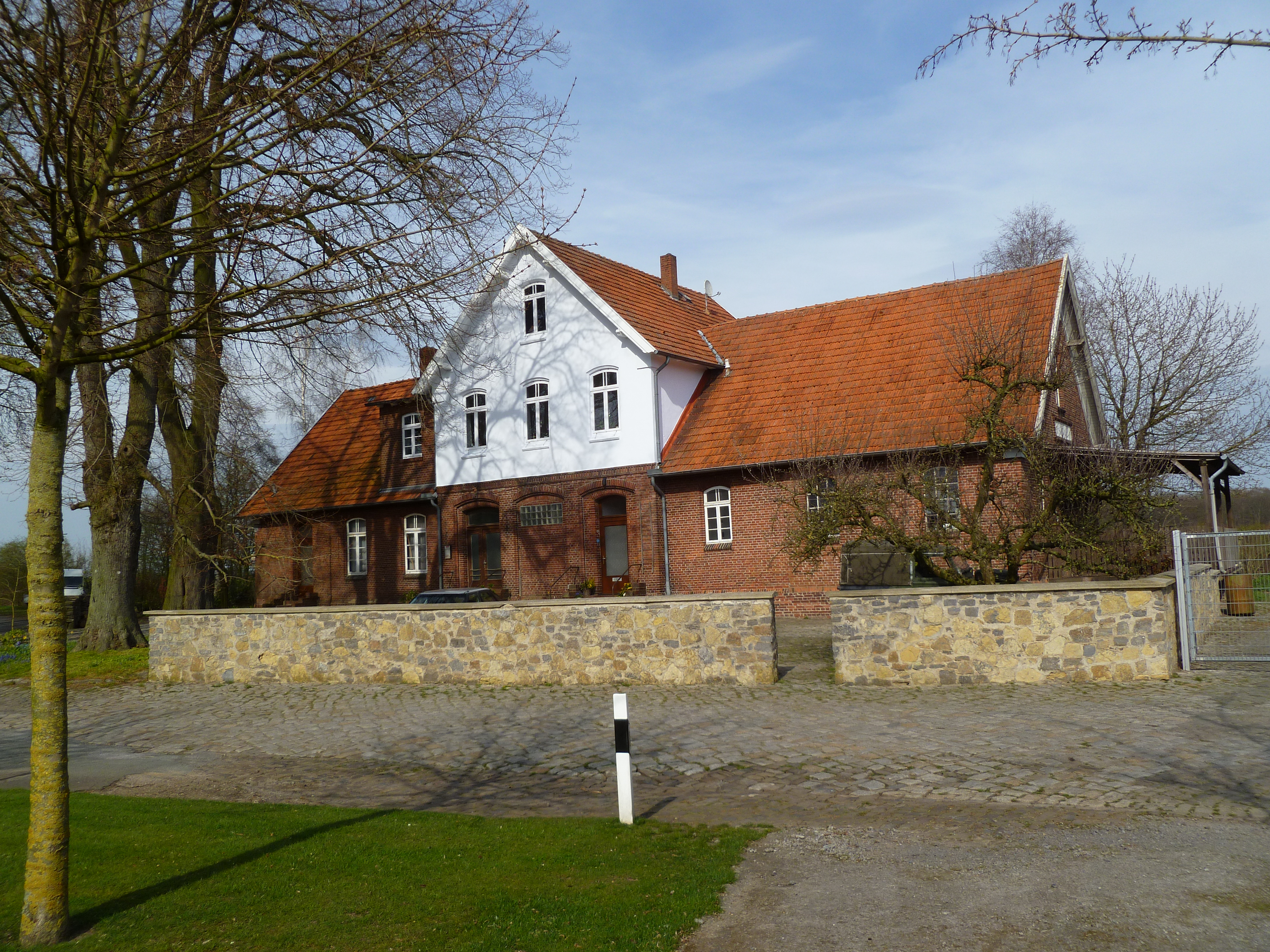 ehemaliger Bahnhof Alfhausen 2015